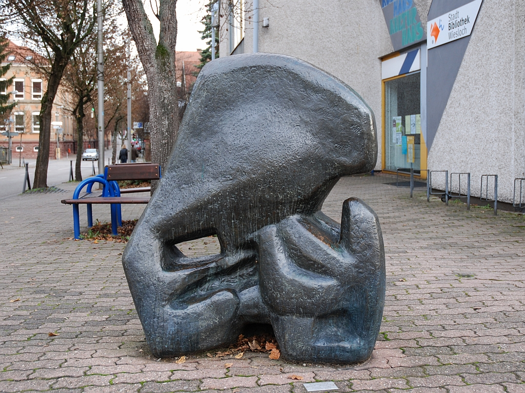 Bronze Urtier (1950) von László Szabó. Standort: Kulturhaus, Gerbersruhstraße Ecke Bergstraße, Wiesloch